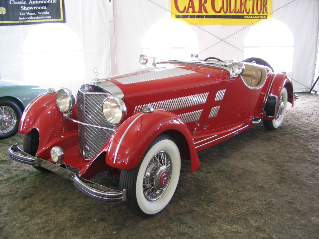 Mercedes-Benz 500K Sport-Roadster Baujahr 1934, fotografiert von Ramgeis in Pebble Beach, Kalifornien im August 2004, GNU-FDL